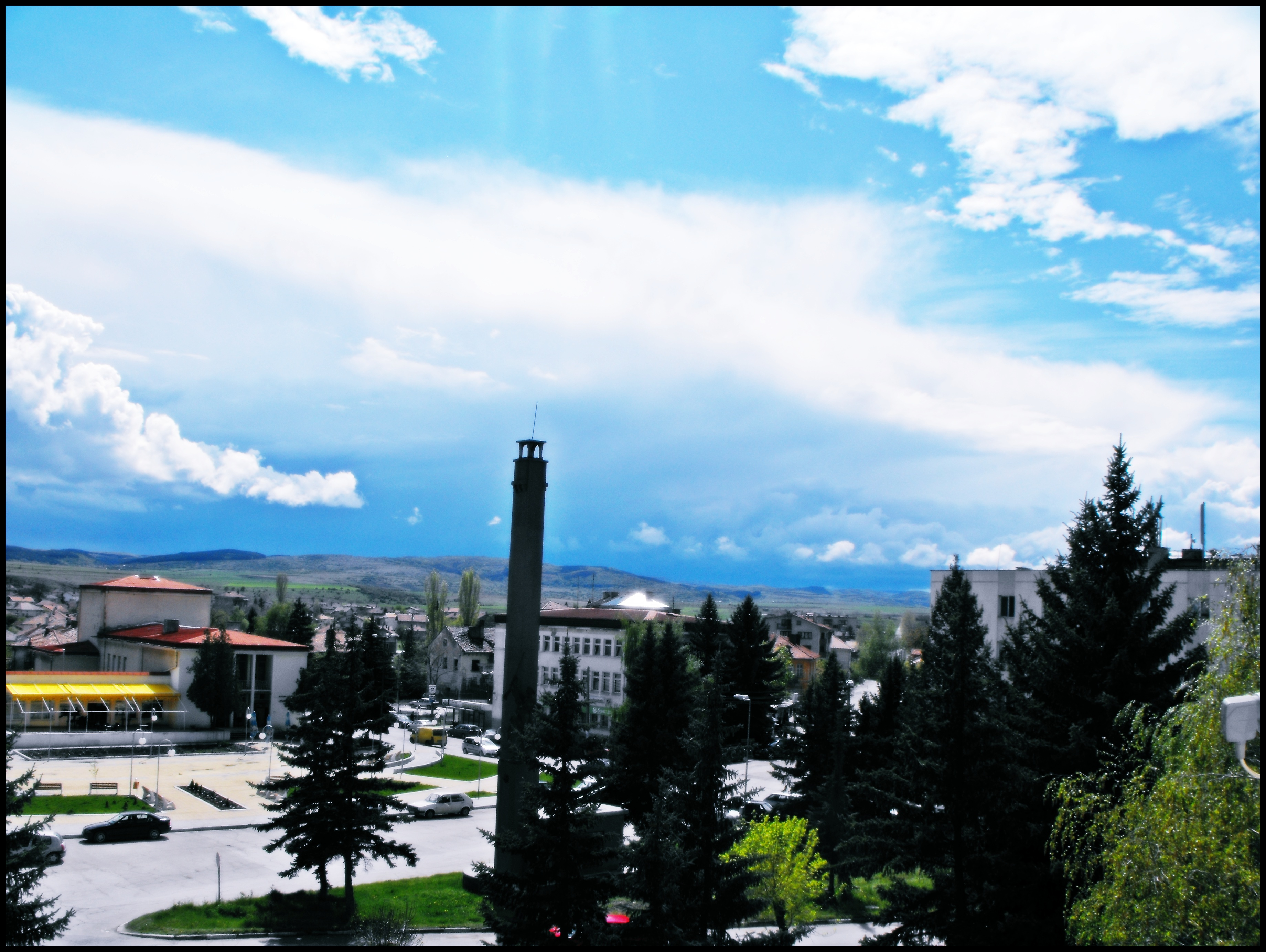 Slivnitsa center